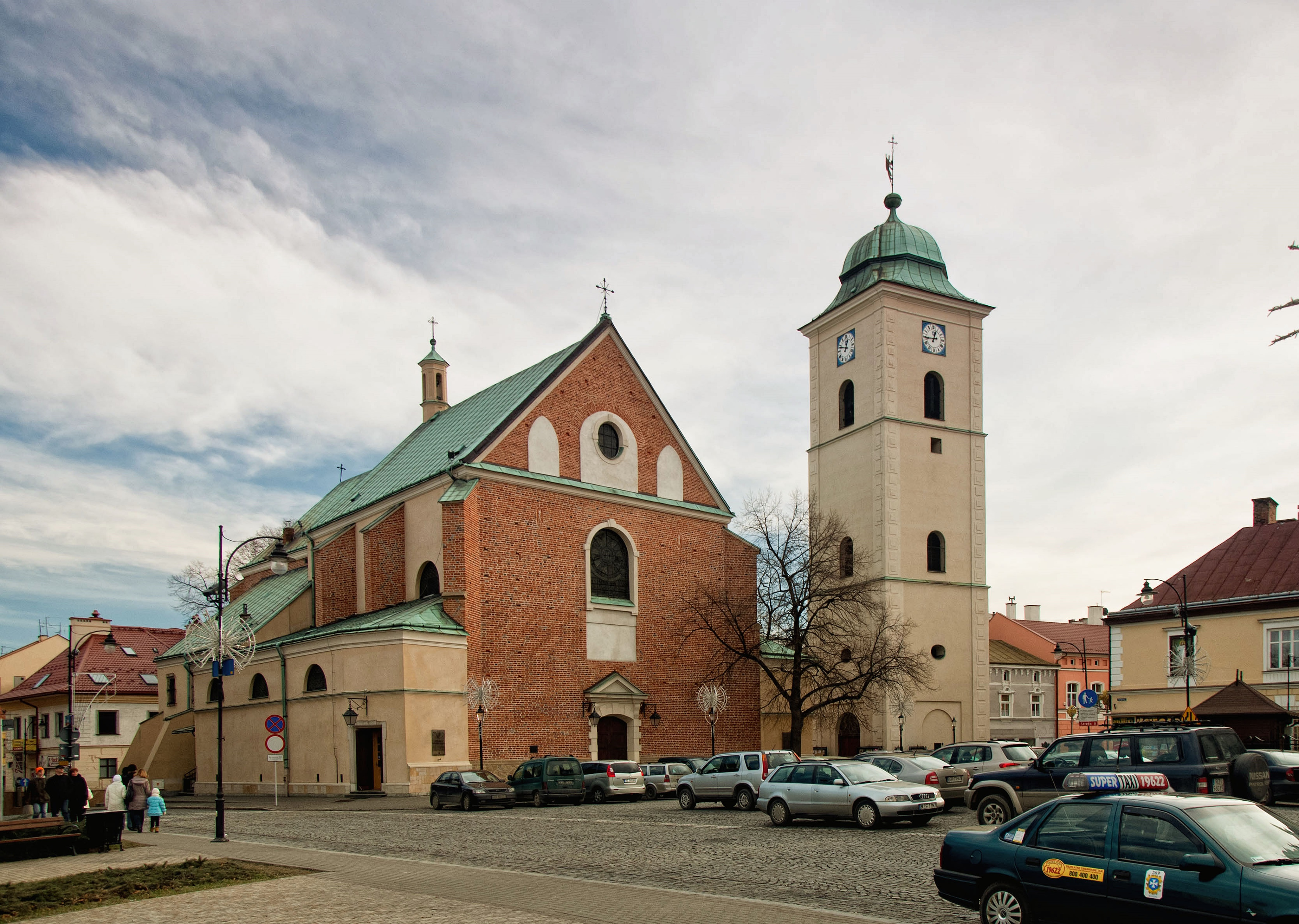 Rzeszów, kościół farny p.w. śś. Stanisława i Wojciecha, 1434, 1623, 1754